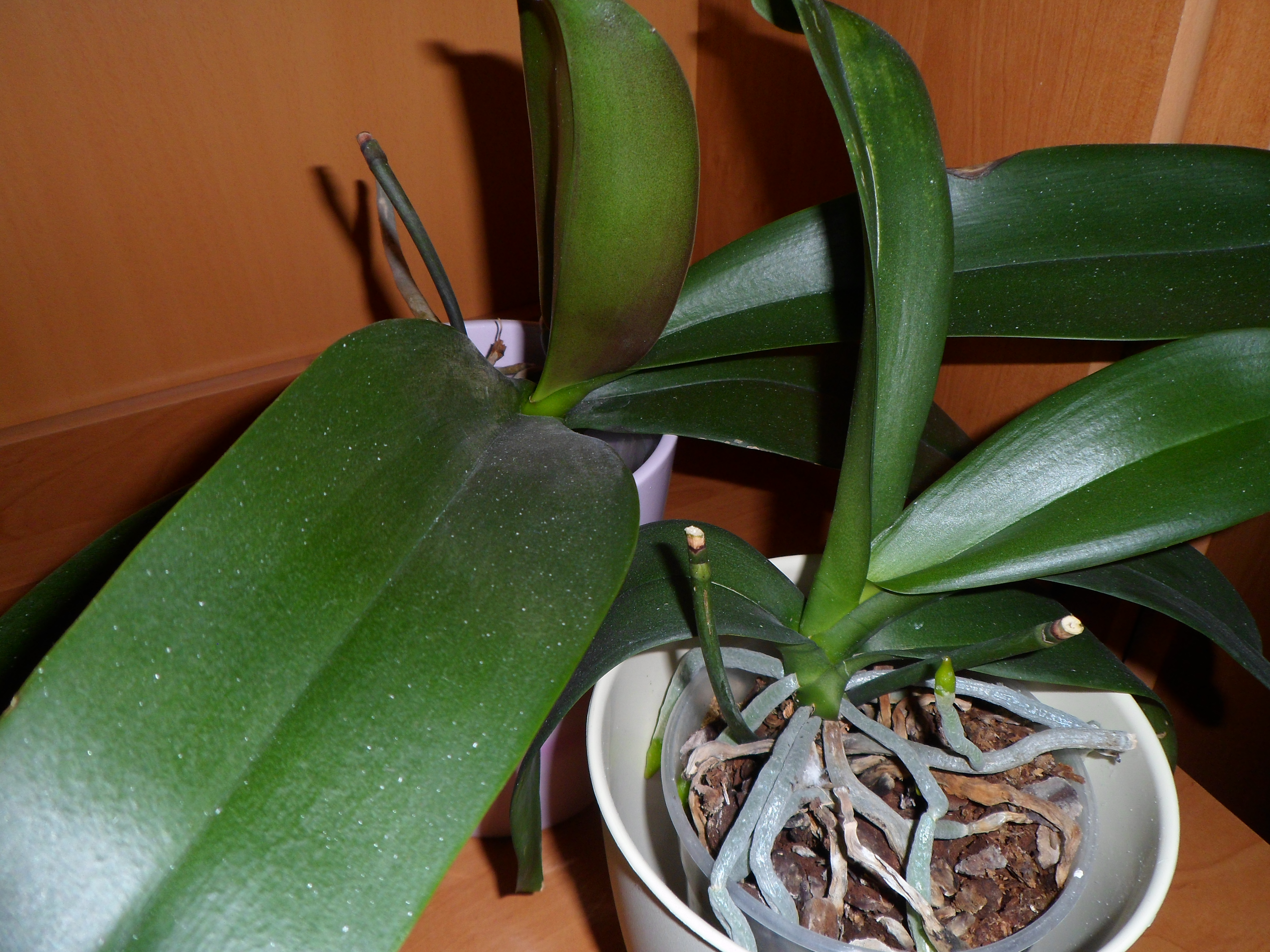 Listy Phalaenopsis